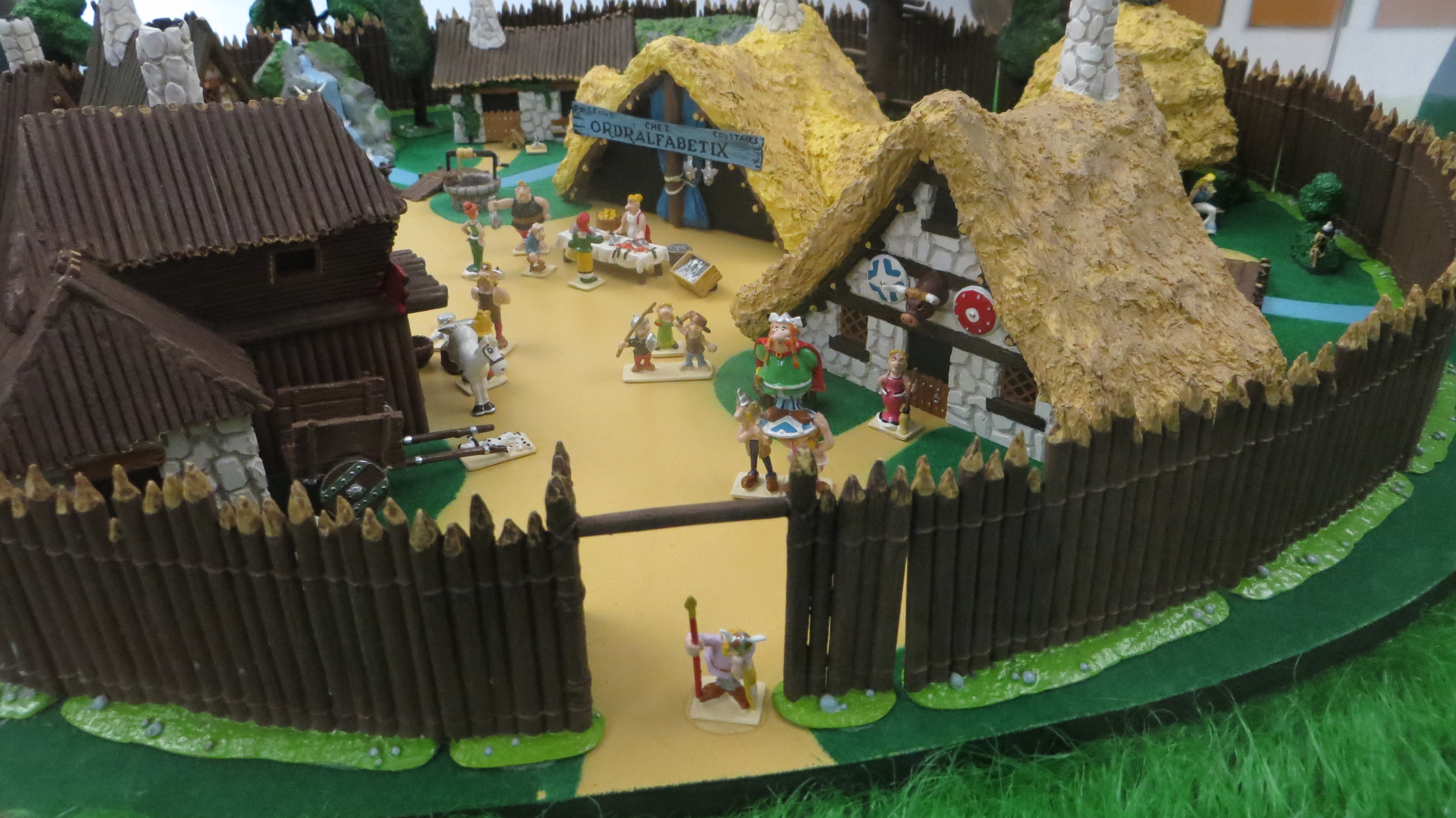 aufgenommen im LWL-Römermuseum in Haltern am See